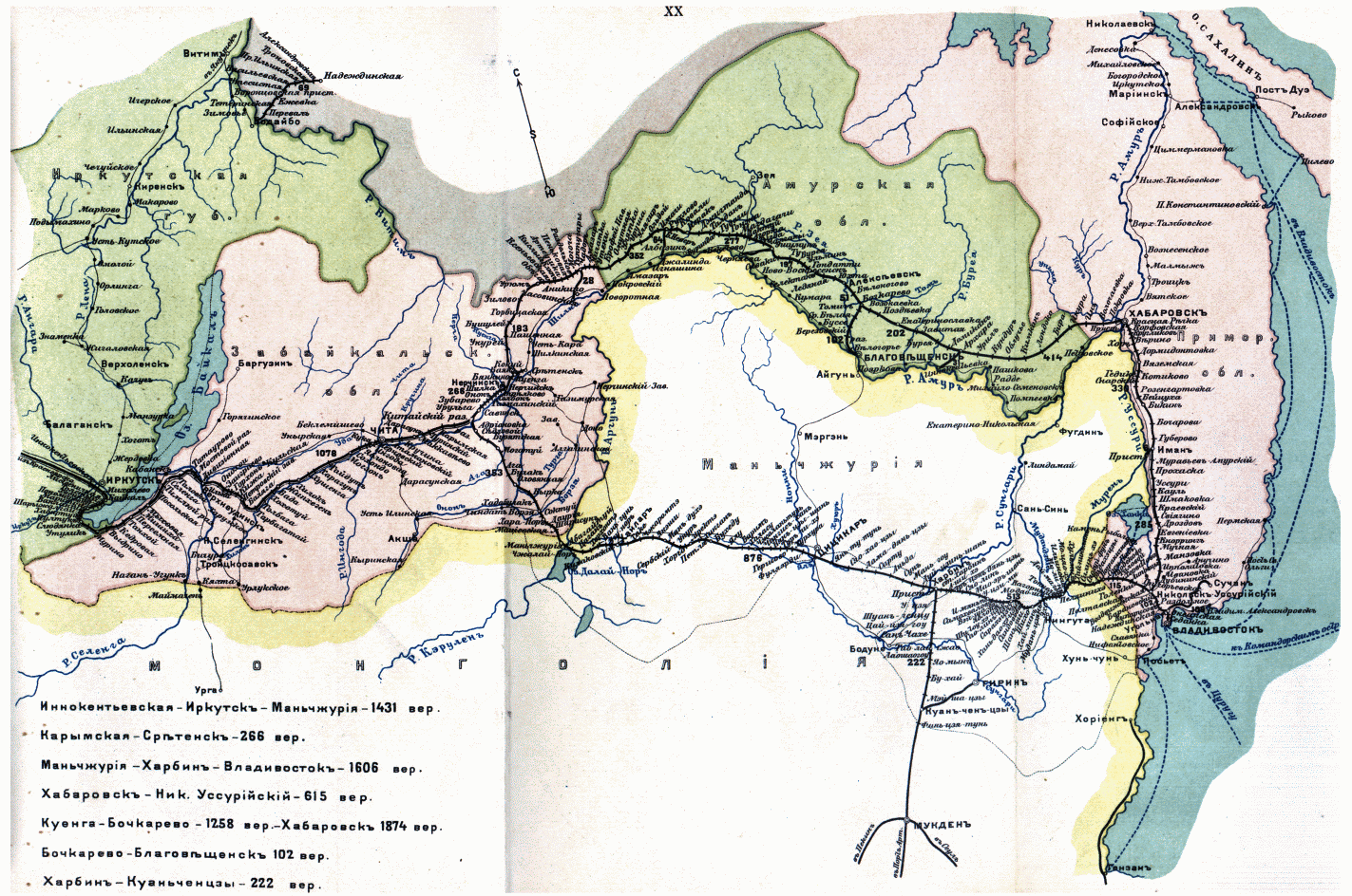 Забайкальская, Амурская, Уссурийская, Китайская Восточная ж/д.